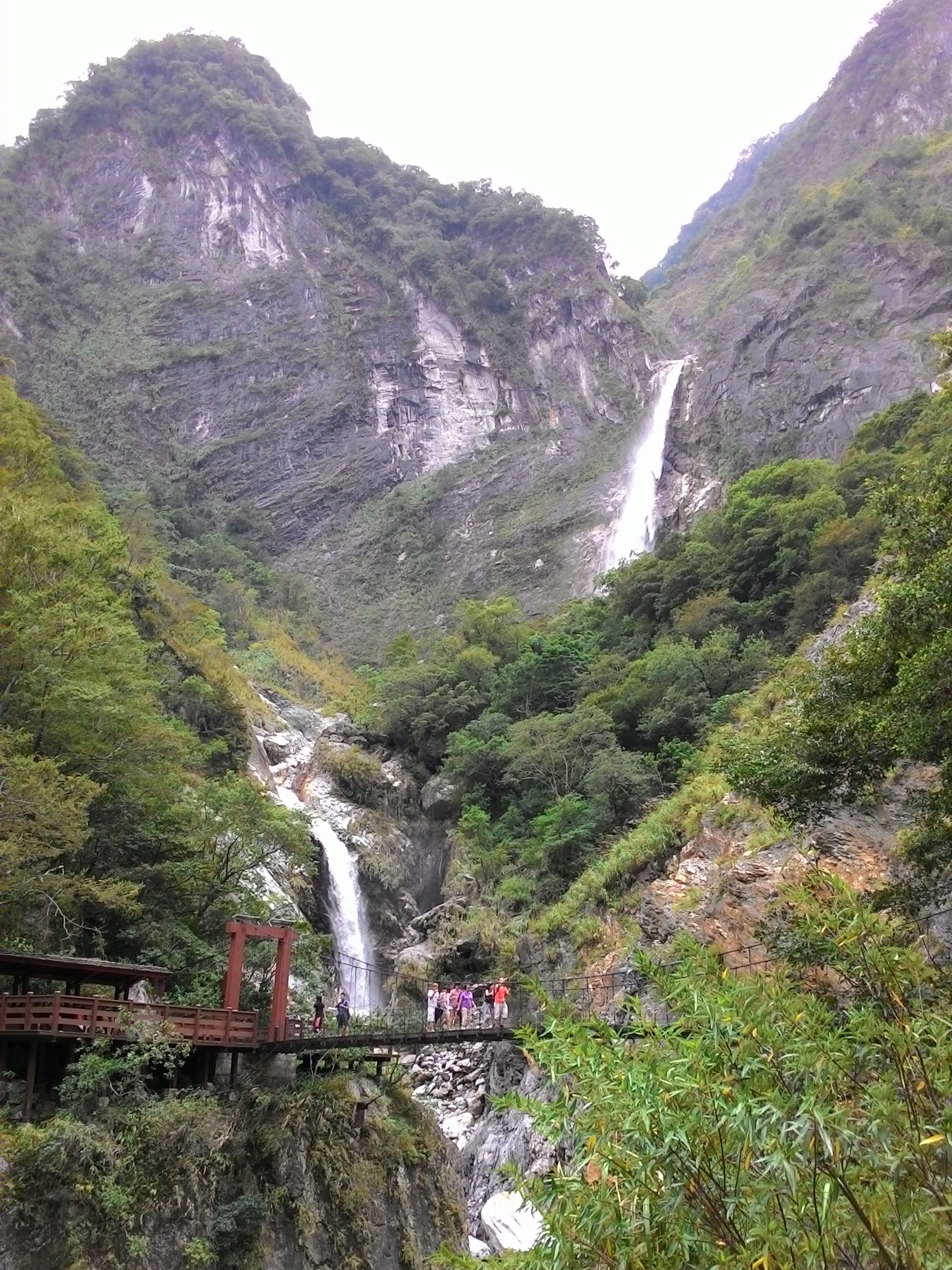 於步道上遠眺白楊瀑布。